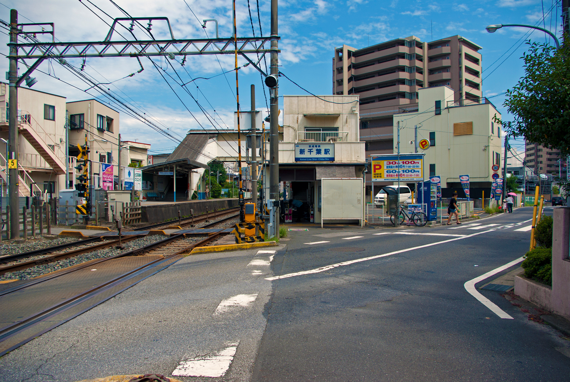 京成電鉄株式会社京成千葉線新千葉駅